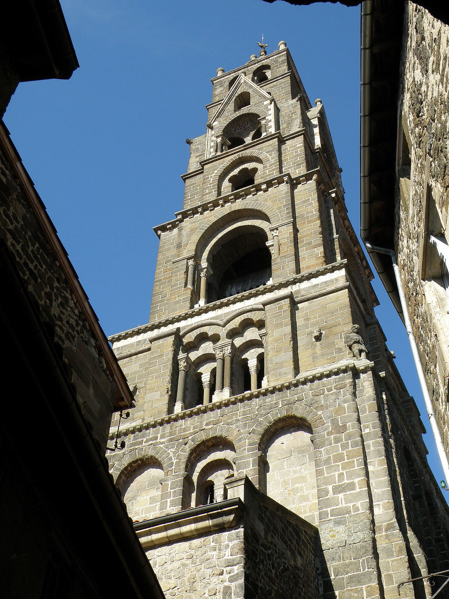 Le Puy-en-Velay (préf. de la Haute-Loire, France). Cathédrale Notre-Dame, clocher.